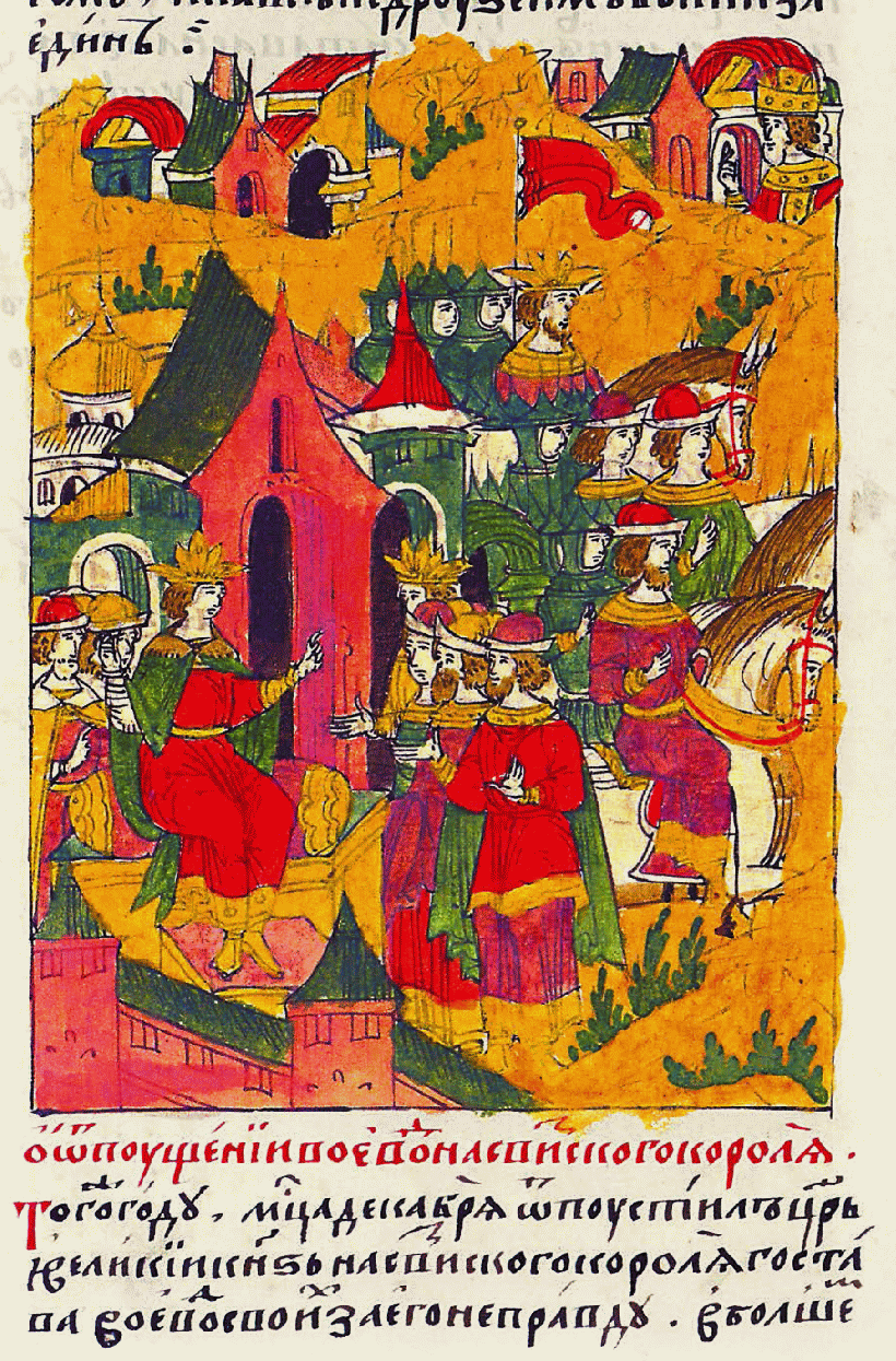 Лицевой летописный свод Об отпущении воевод на шведского короля. В том же году в месяце декабре отпустил царь и великий князь на Шведского короля Густава воевод своих за его неправду: в большом [полку боярин и воевода князь Петр Михайлович Щенятев да боярин и воевода князь Дмитрий Федорович Палецкий. В передовом полку - воеводы Семен да Никита Васильевичи Шереметевы. В правой руке - князь Андрей Иванович Ногтев да Иван Меньшой Васильевич Шереметев. В левой руке - Захарий Иванович Очин да Михаил Петрович Головин. В сторожевом полку - князь Димитри Семенович Шастунов да Петр Петрович Головин ]